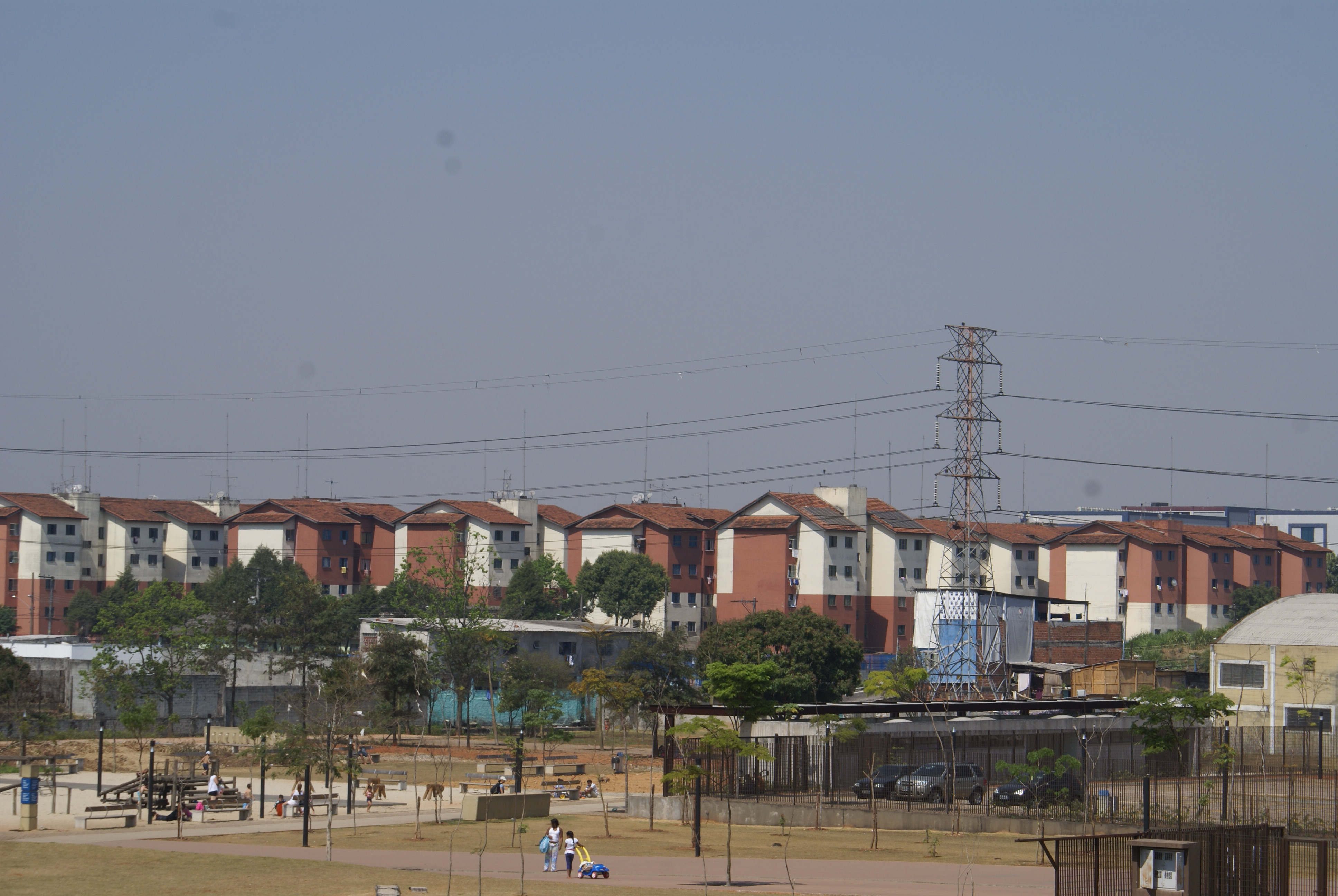 Popular housing in Carandiru neighborhood, São Paulo City, Brazil. - Conjunto Habitacional popular no bairro do Carandiru, em São Paulo, Brasil.